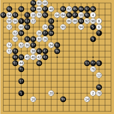 Alpha Go adimen artifizialeko programak Fan Hui jokalariaren aurka egin zuen 4. partiduko (2015eko urriaren 8an) lehen zatia.